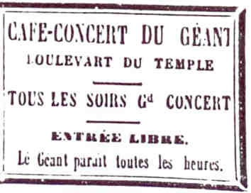 Annonce du Café-Concert du Géant.